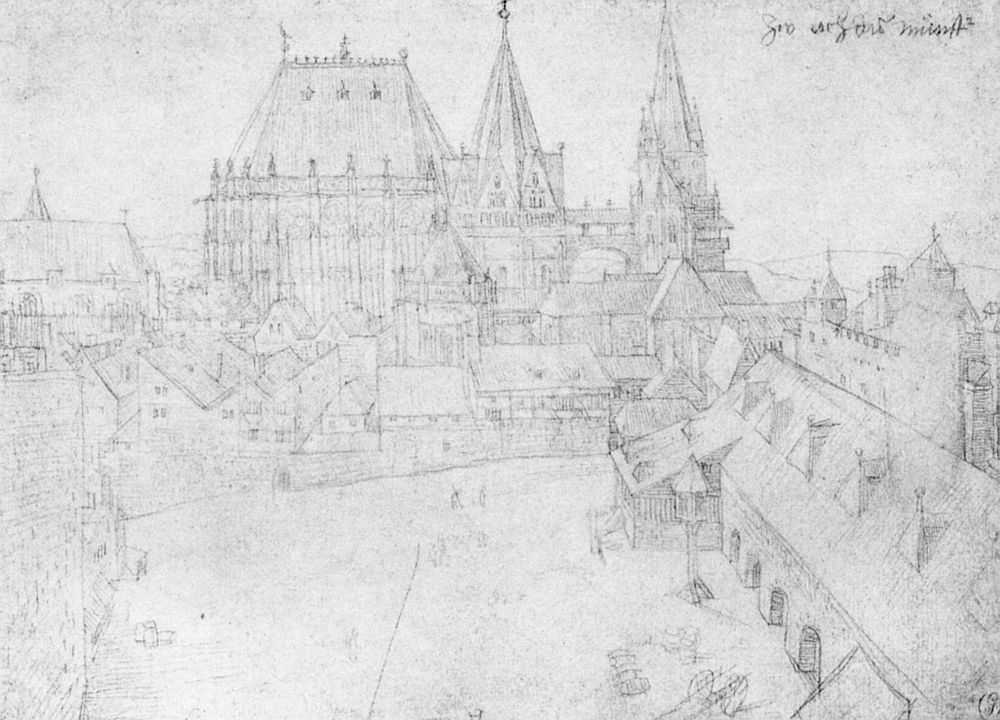 Architekturzeichnung, aus dem Silberstiftskizzenbuch, das während der Reise in die Niederlande entstand